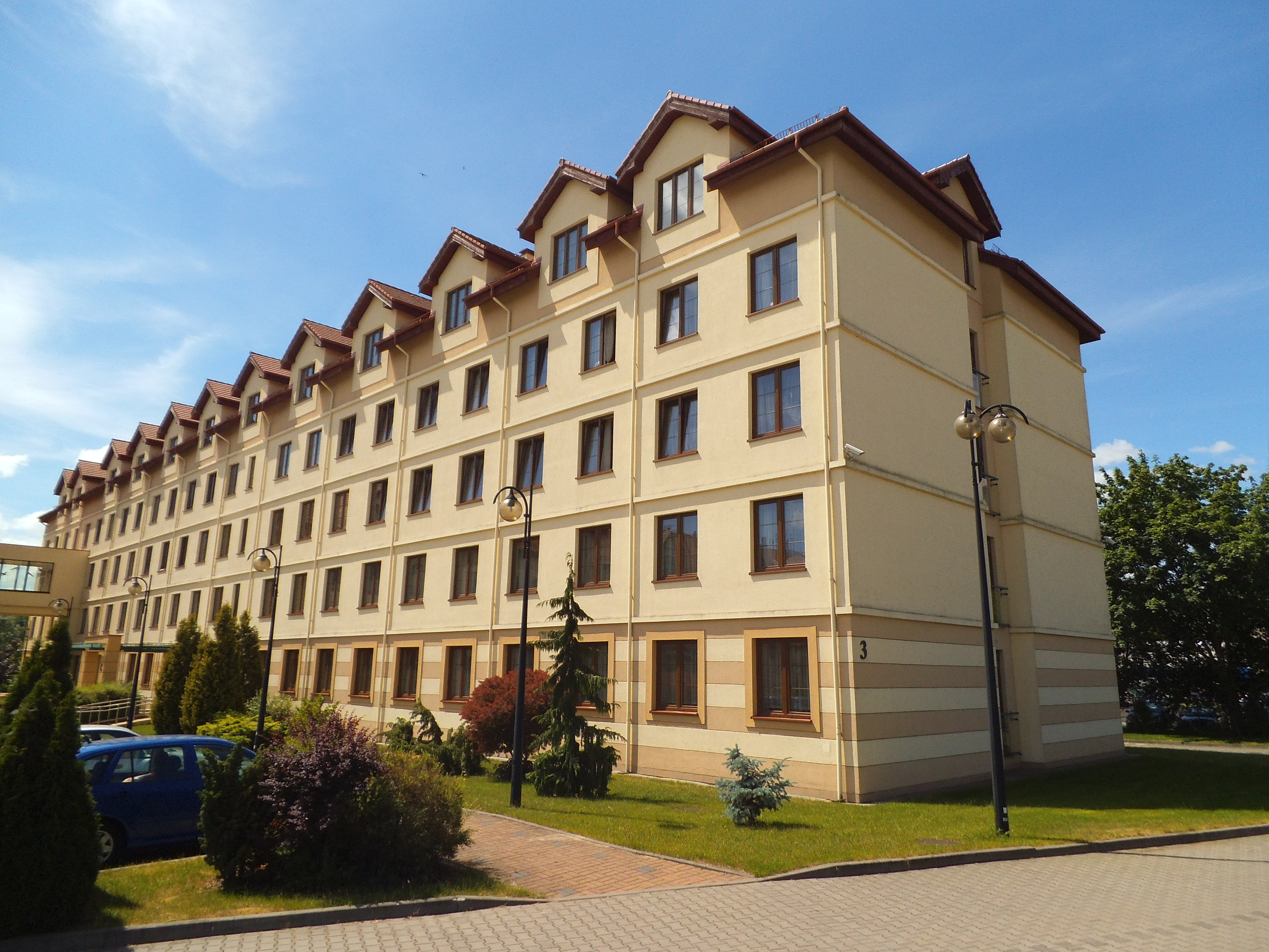 Dom studencki Wyższej Szkoły Kultury Społecznej i Medialnej w Toruniu